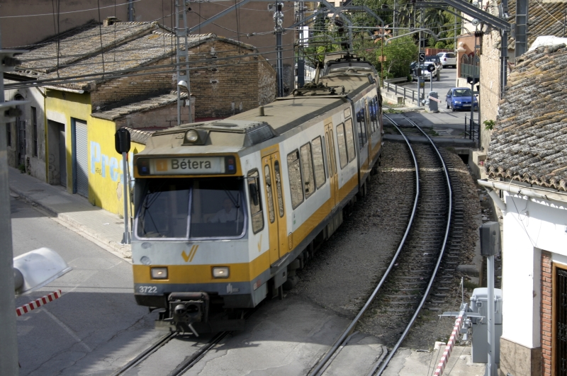 Unidad de Tren Articulado (UTA) 3722 saliendo de Godella